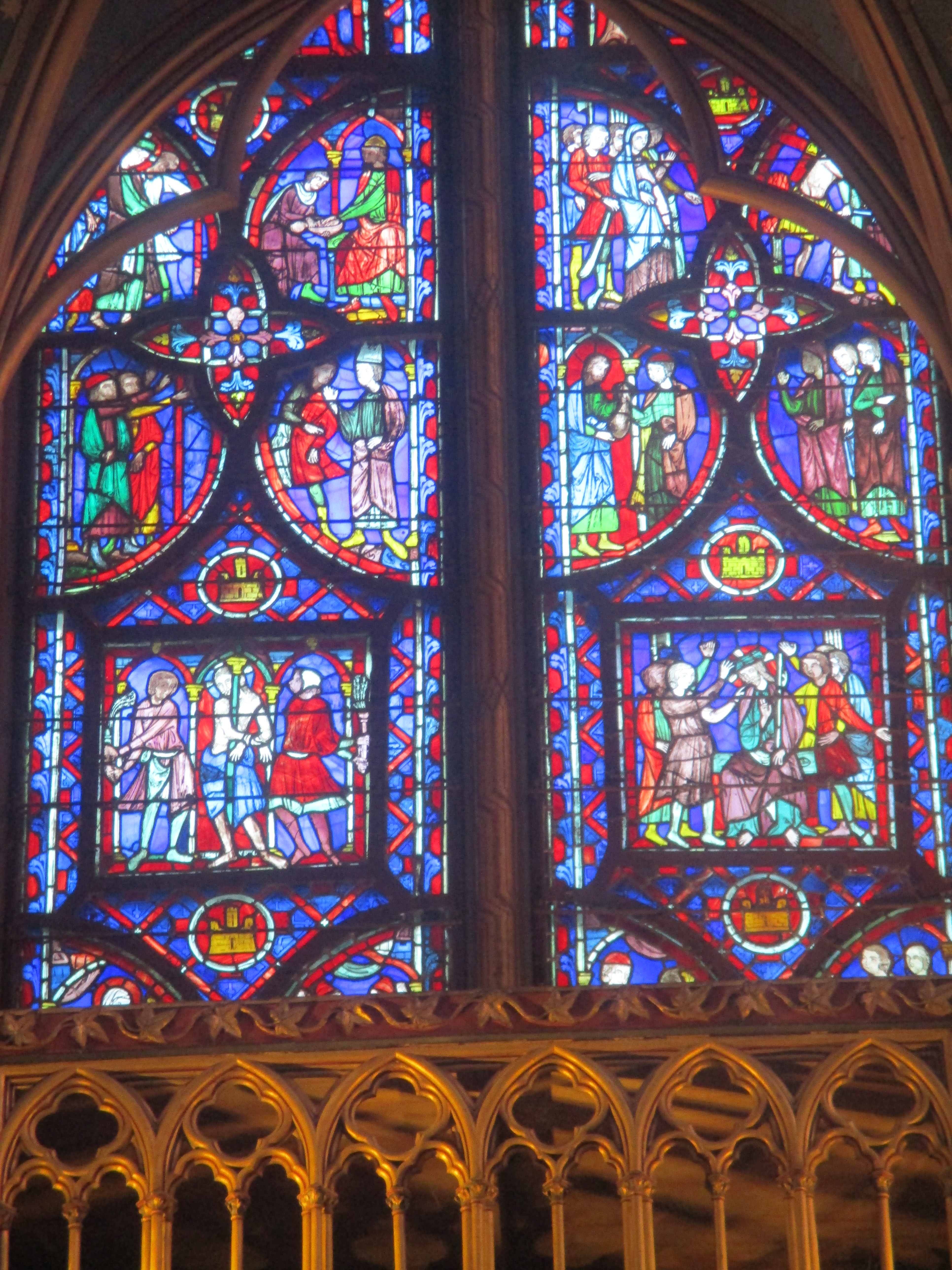 Vitrail de la Passion du Christ, abside de la Sainte-Chapelle.